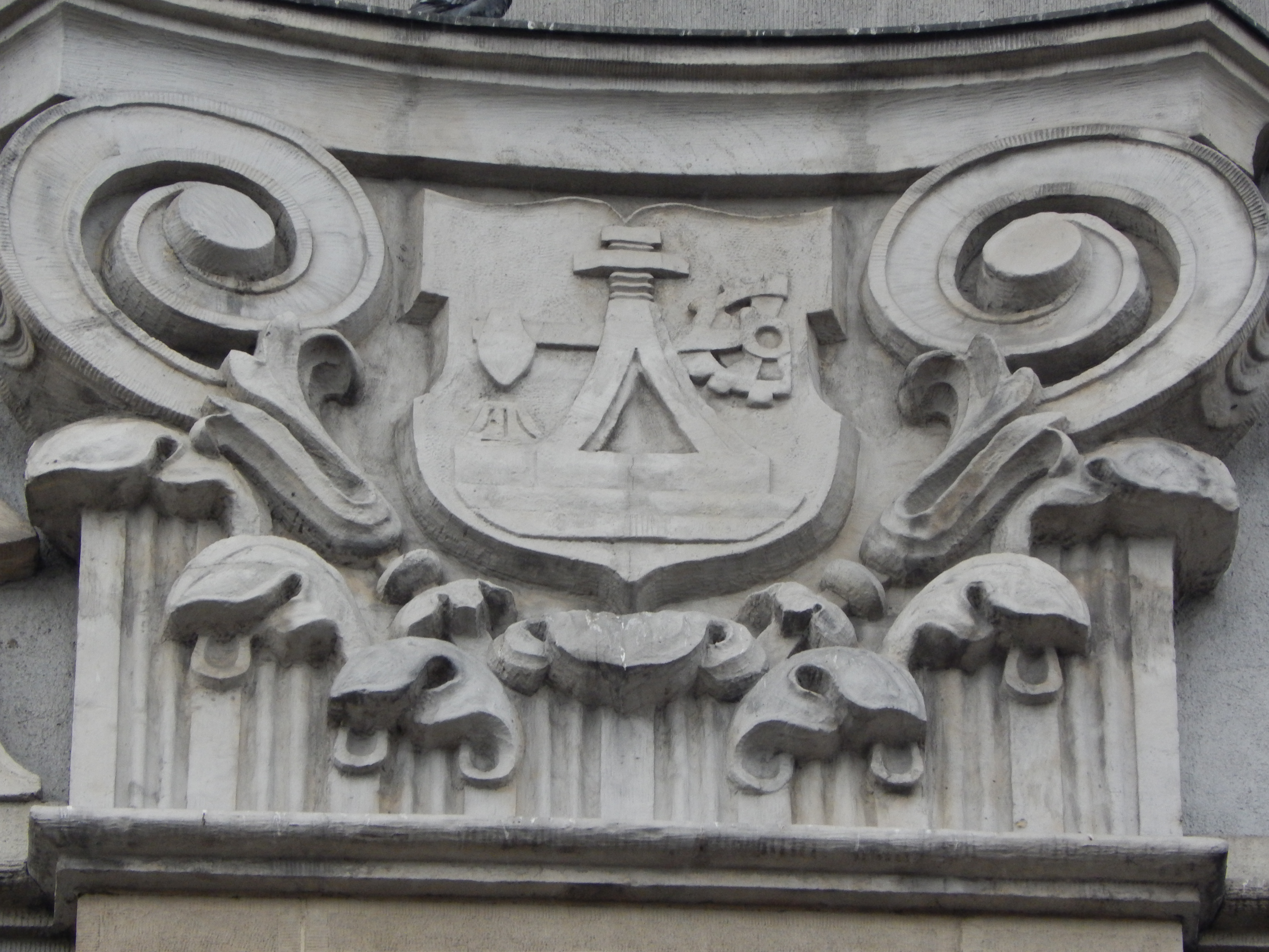 Fragment elewacji gmachu Sejmu Śląskiego - herb Katowic